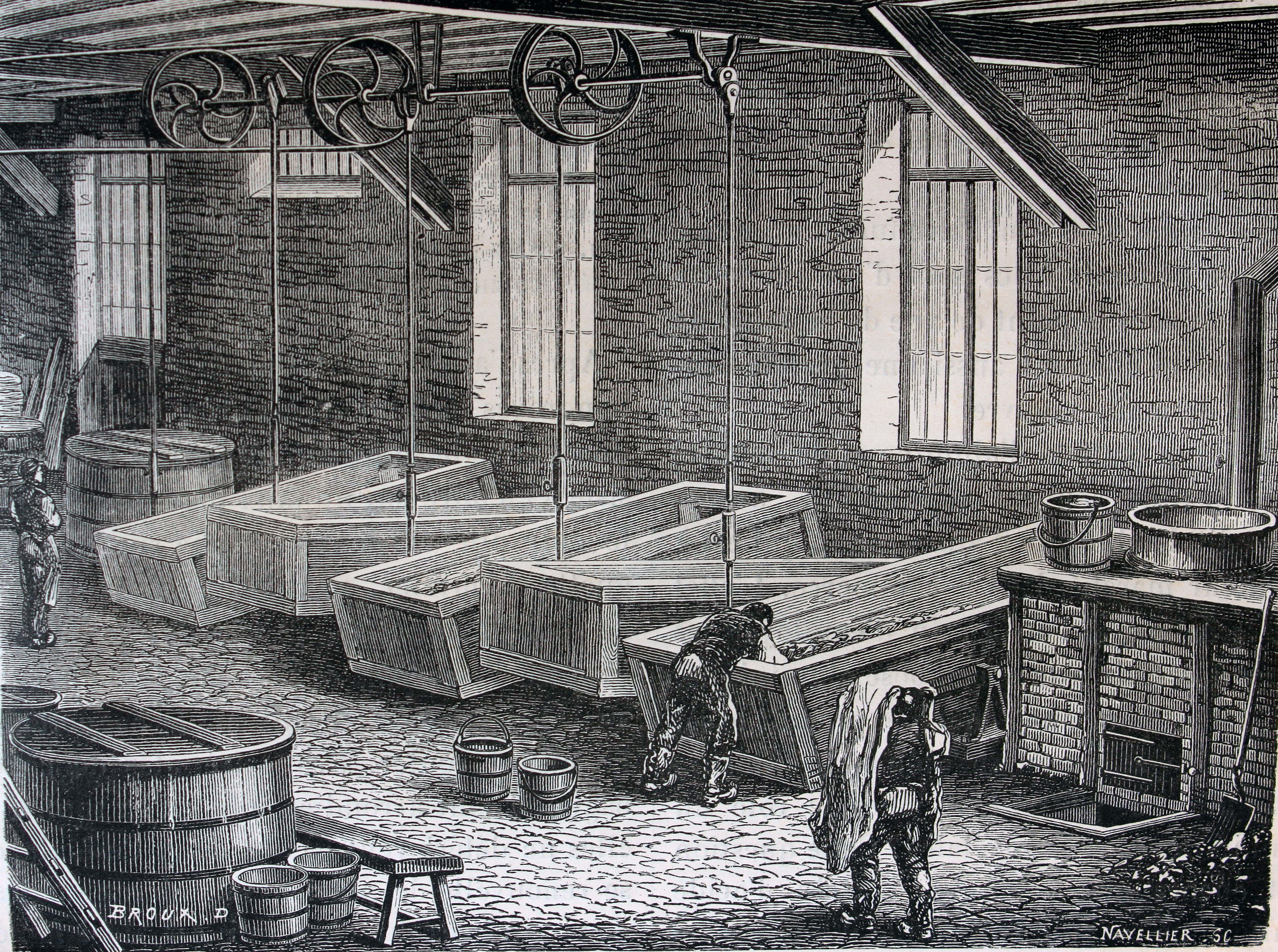 Ilustraciones de la obra : Les merveilles de l'industrie ou, Description des principales industries modernes / par Louis Figuier. - Paris : Furne, Jouvet, [1873-1877]. - Tome II